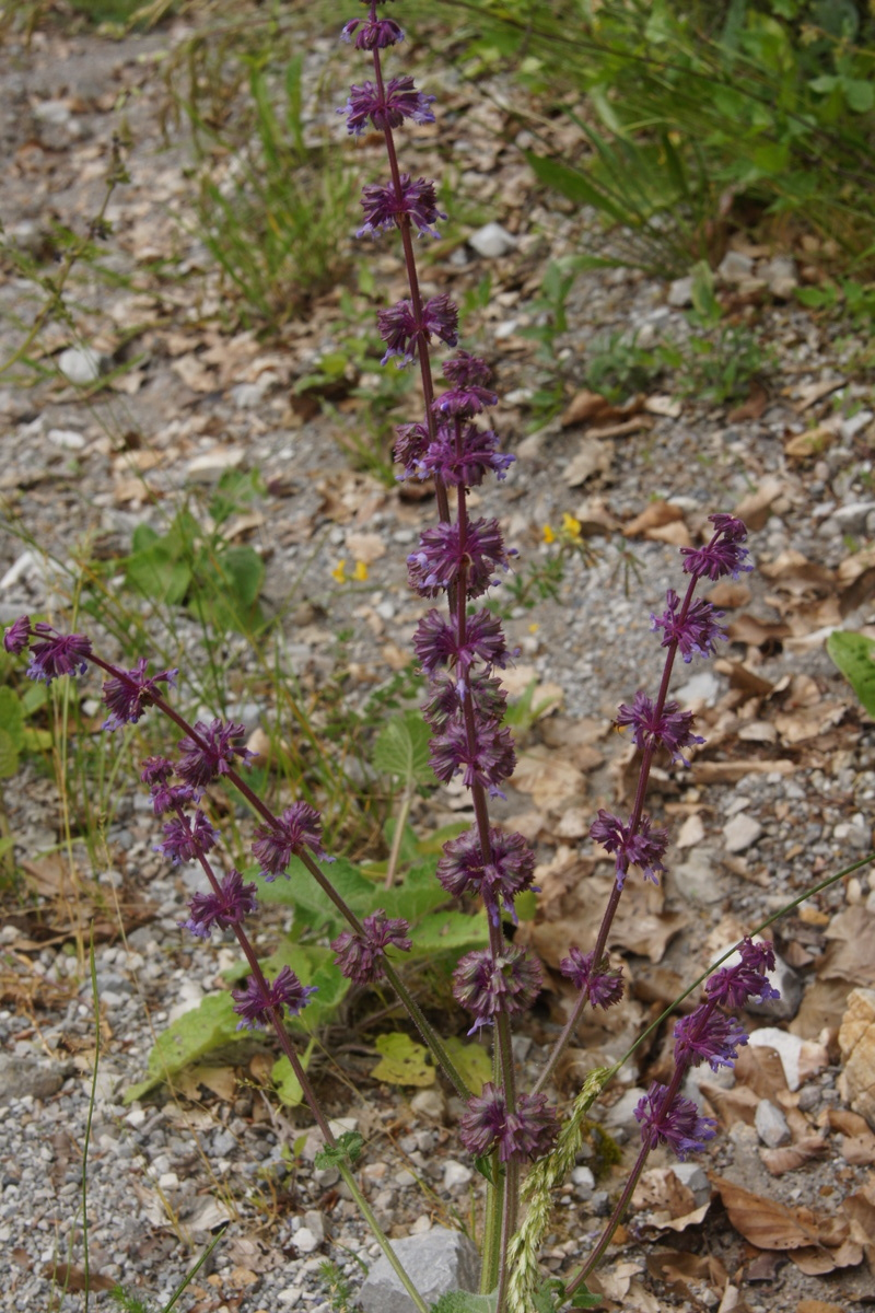 Vretenčasta kadulja v Selu nad Polhovim Gradcem.